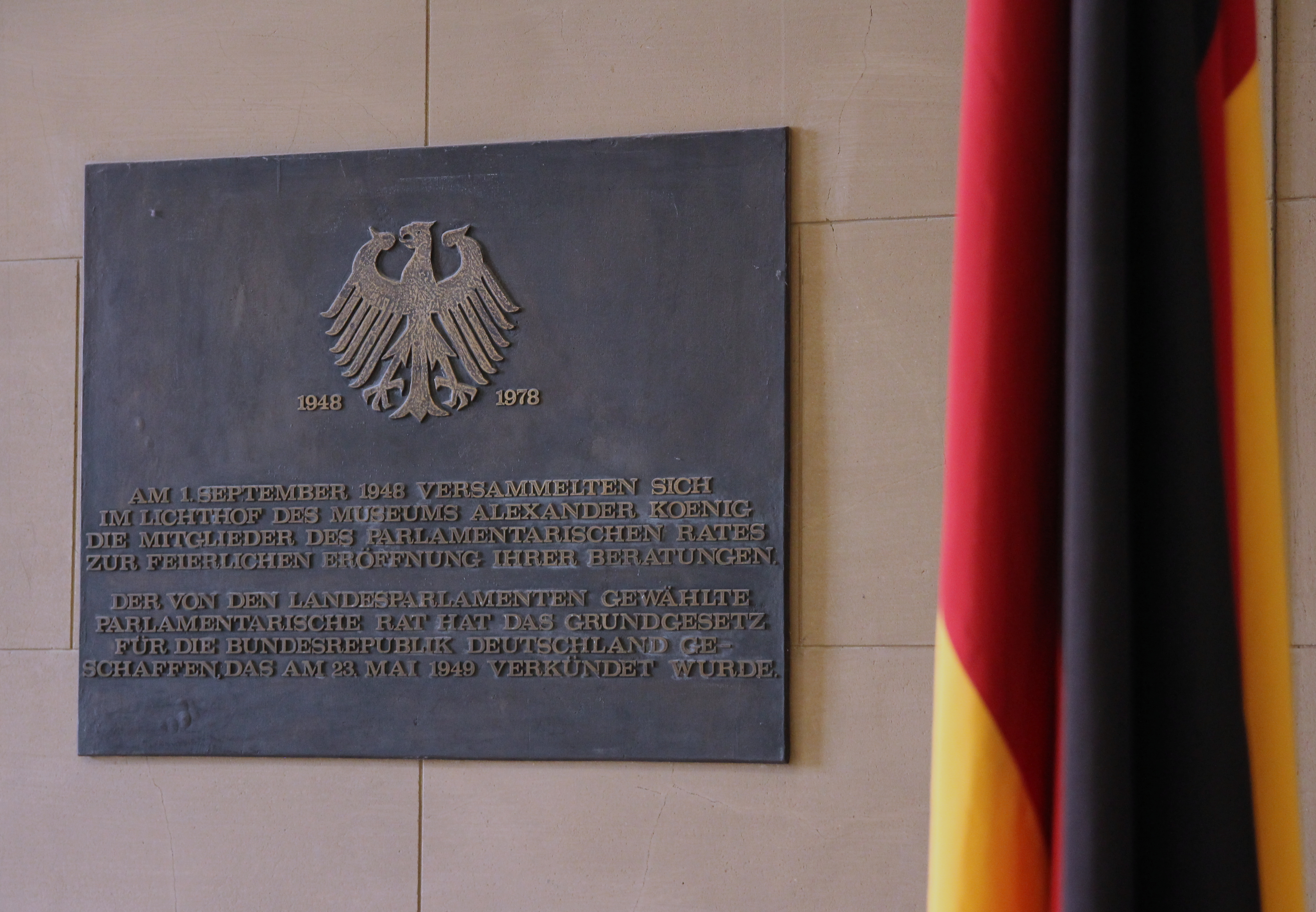 Museum Koenig, Plakette zum Parlamentarischen Rat sowie schwarz-rot-goldene Flagge.